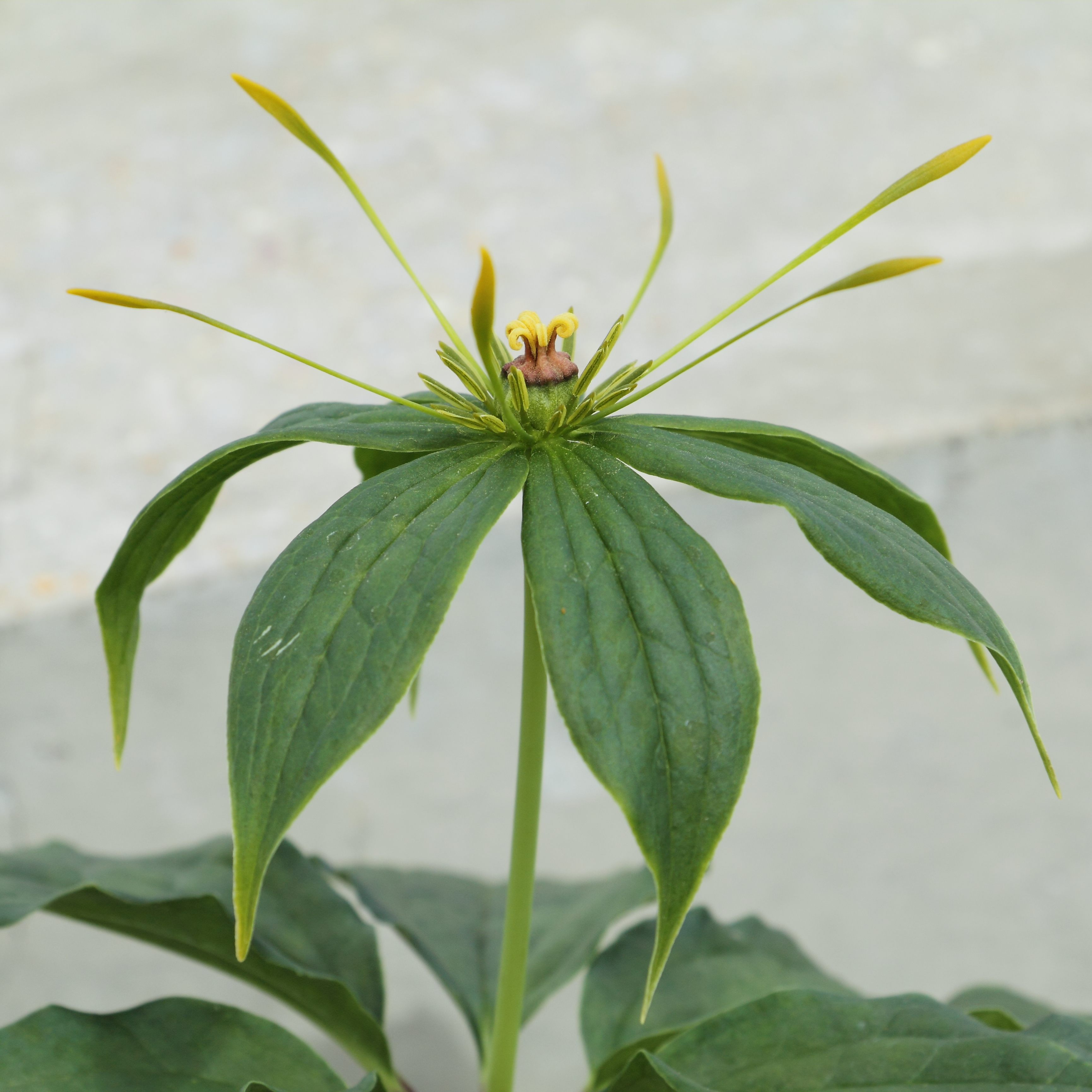 Paris polyphylla var. chinensis, identifierad med hjälp av befintlig skylt vid Kew Gardens, London.